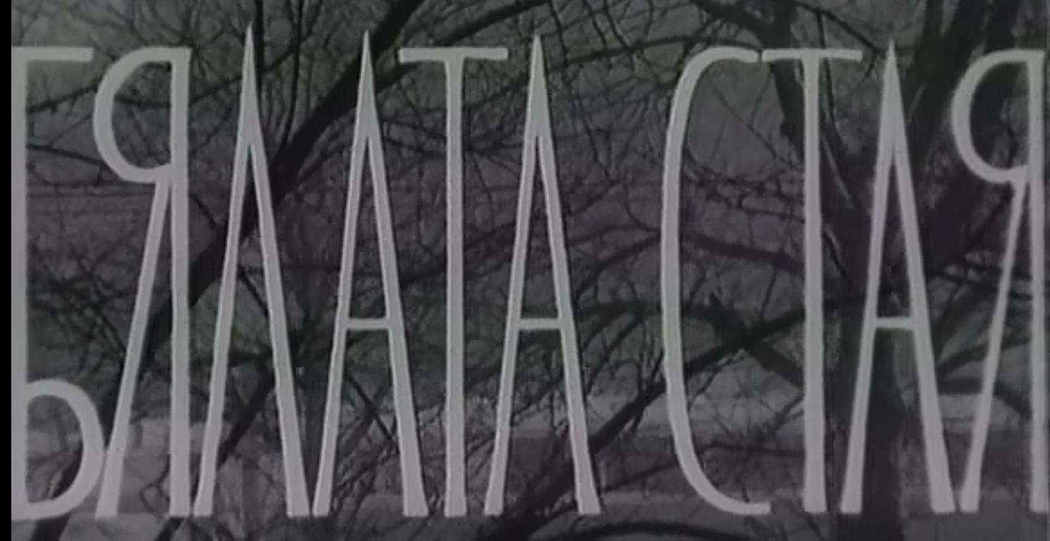 Начален кадър от филма "Бялата стая"